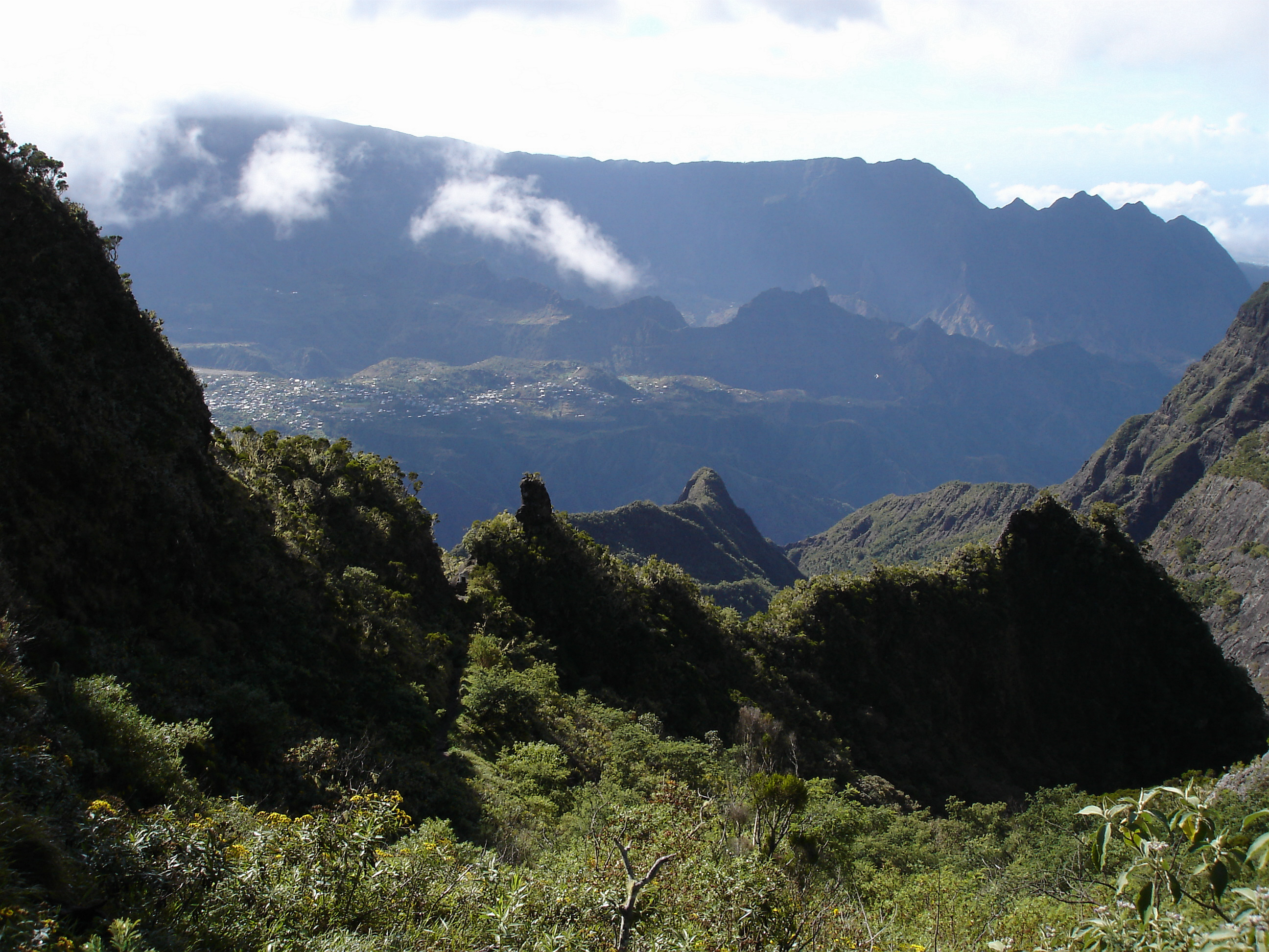 Description: Cilaos vu depuis le col du Taïbit, novembre 2004, La Réunion Source: Bouba